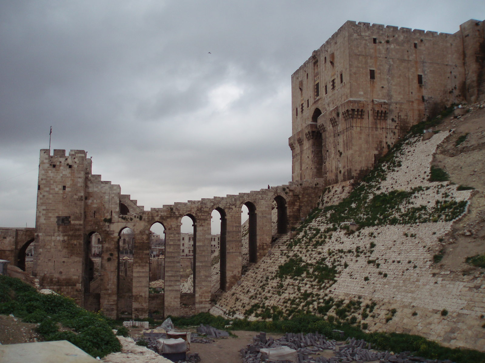 بوابة قلعة حلب و يظهر أيضاً في الصور الجسر المقنطر